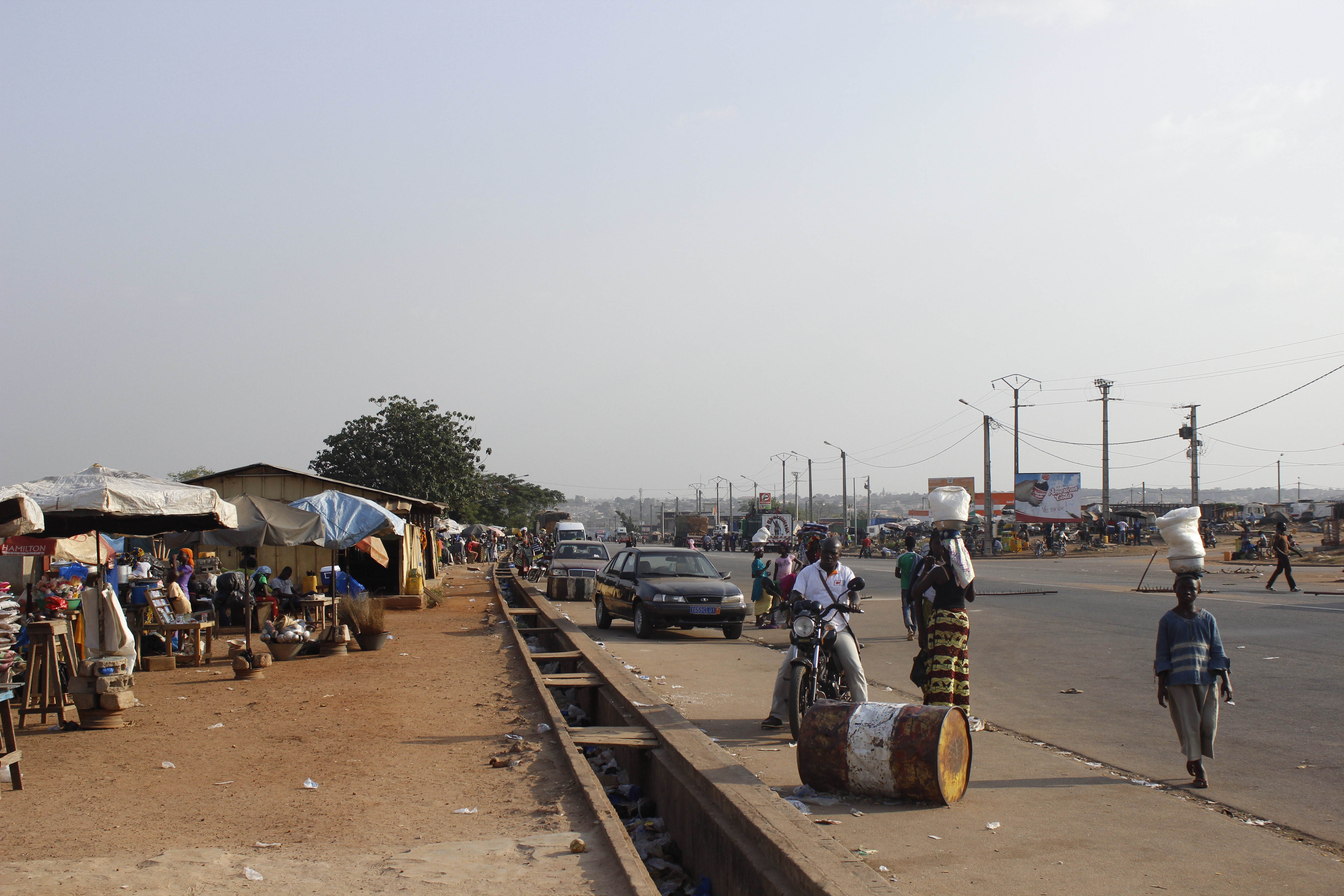 photo prise au corridor nord de bouaké,route de katiola